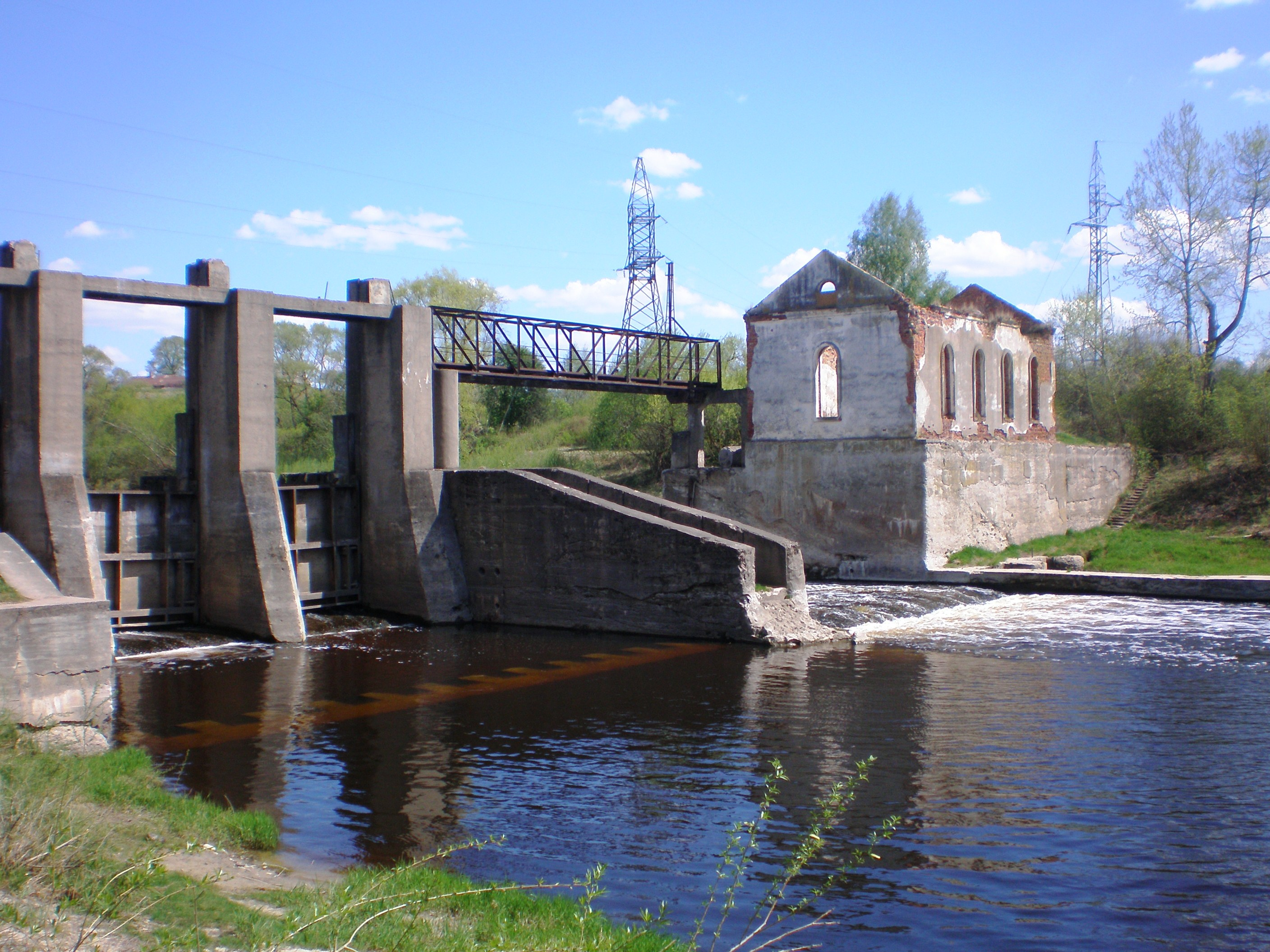 Kruosto HE užtvankos ant Nevėžio griuvėsiai, Kėdainių raj.